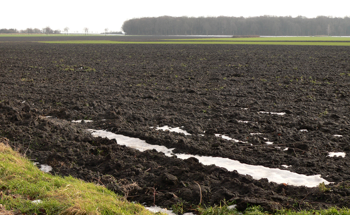 Schwarzerde bei Harsum, im Hintergrund (zwischen Asel und Borsum) der Wald Borsumer Holz auf Schwarzerde